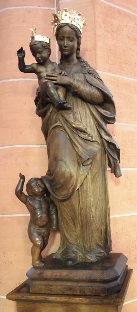 Die sogenannte Feissche Madonna in der Pfarrkirche St. Ulrich zu Deidesheim ist eine Stiftung der Brüder Richard und Oswald Feis an die katholische Pfarrei im Jahr 1928.